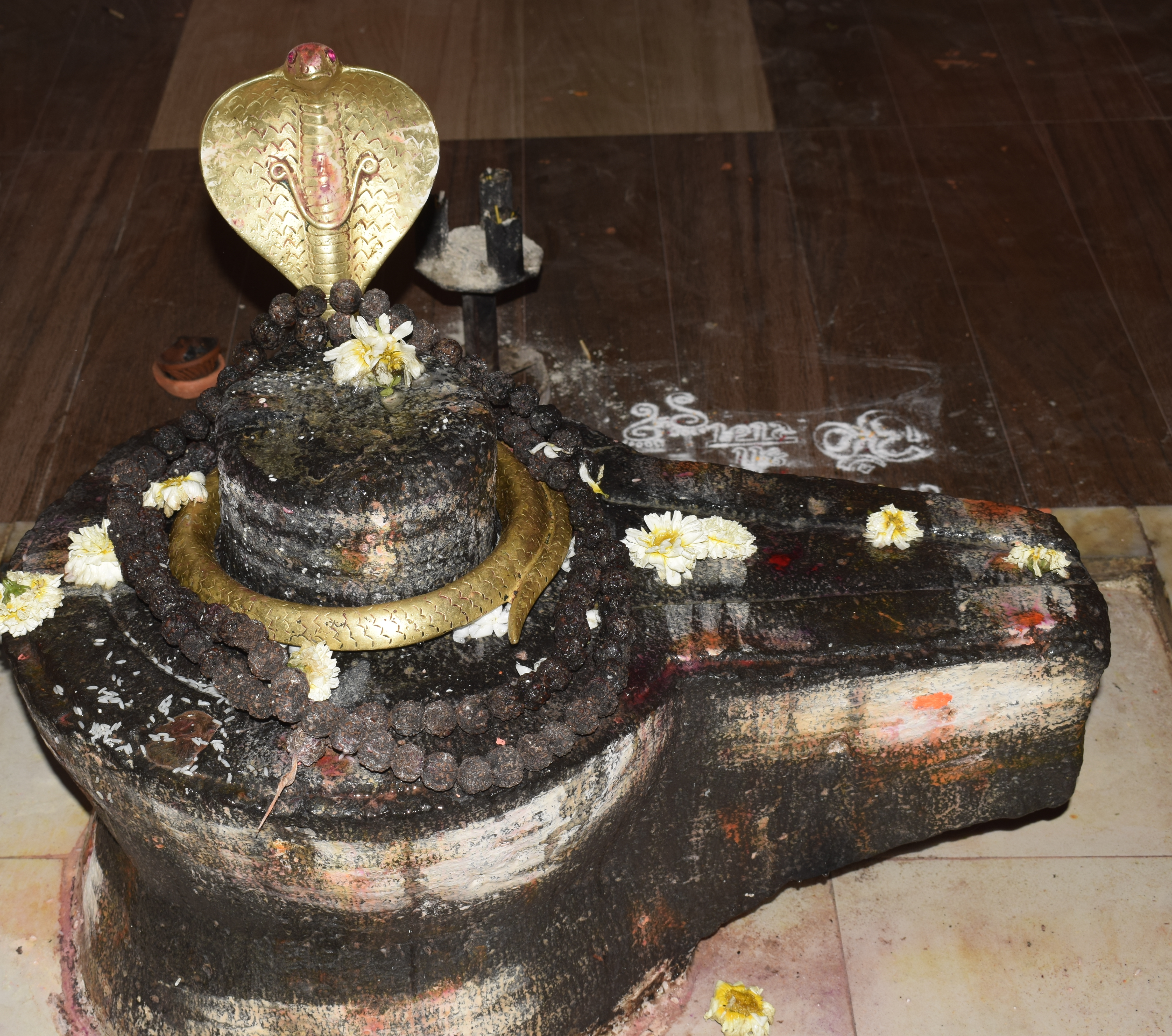 श्री विश्वेश्वर लिंग